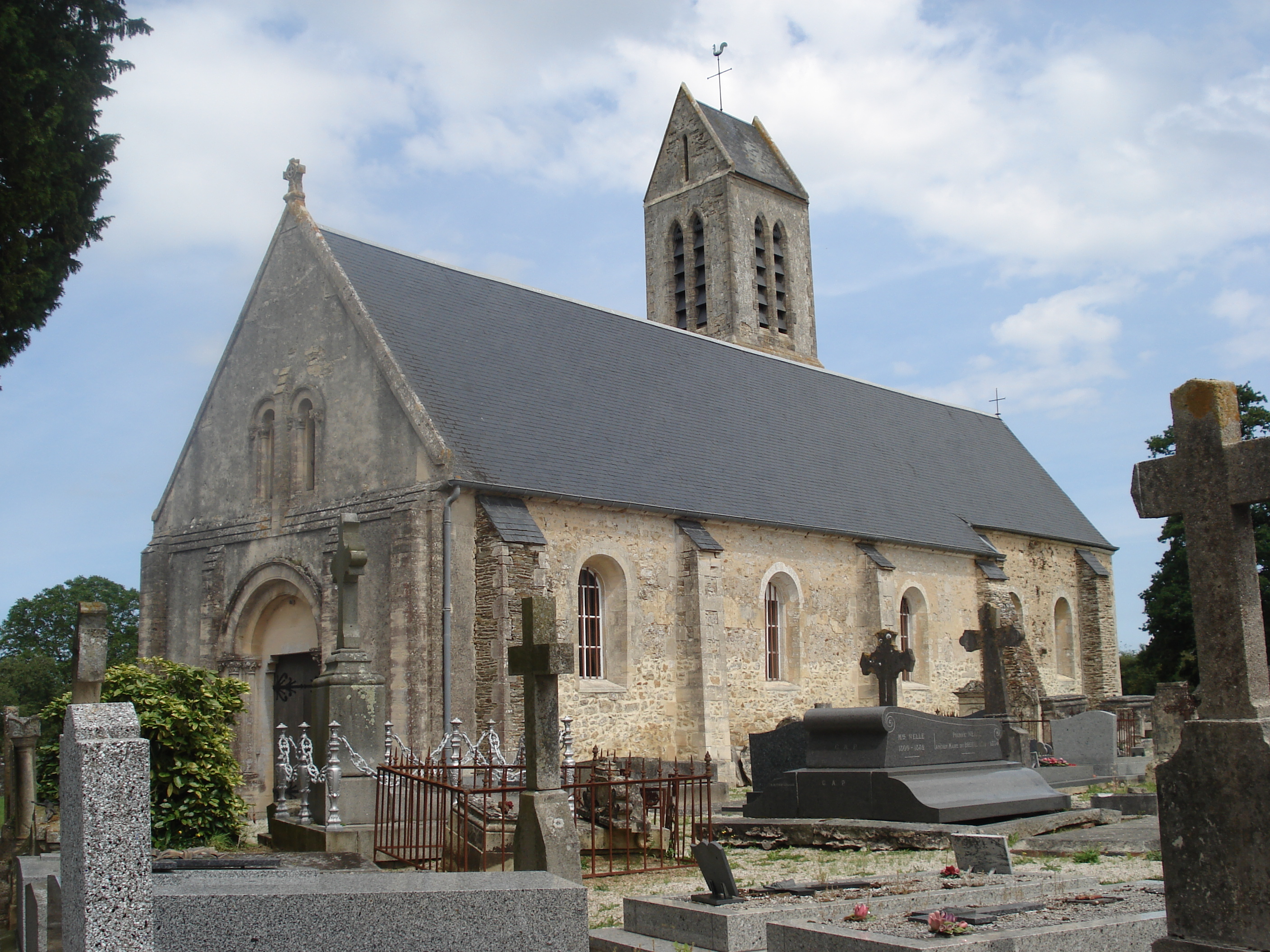 Eglise du Breuil-en-bessin